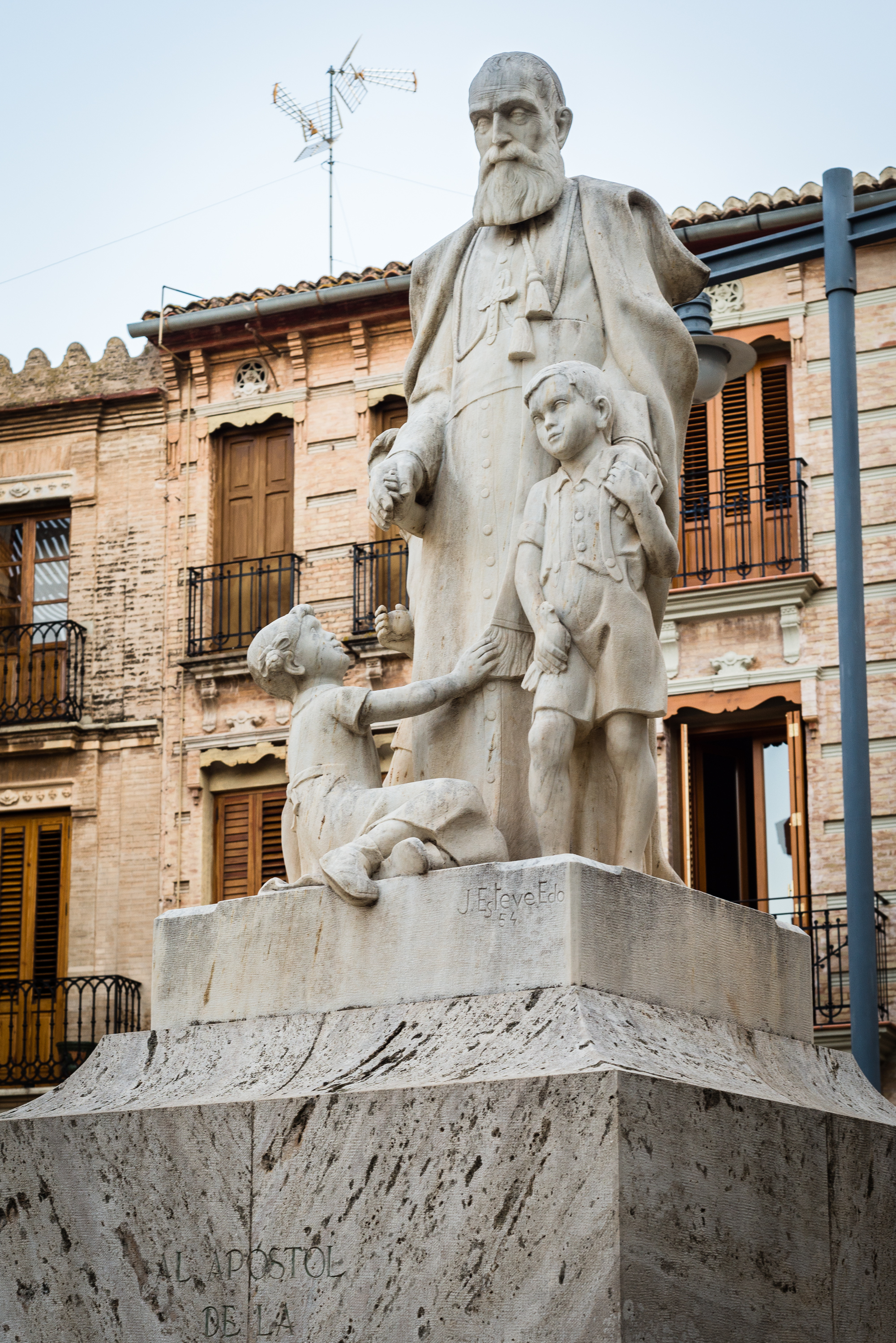 Monumento al Padre Luis Amigó en la Plaza de la Constitución de Massamagrell.